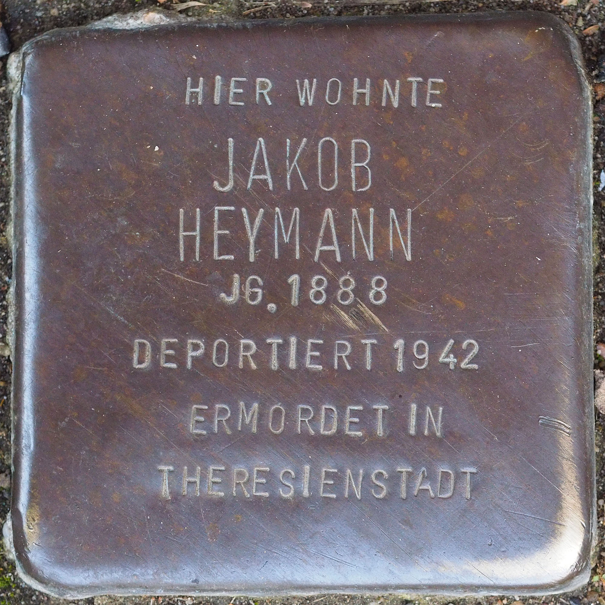 Stolperstein VIE: Heymann, Jakob